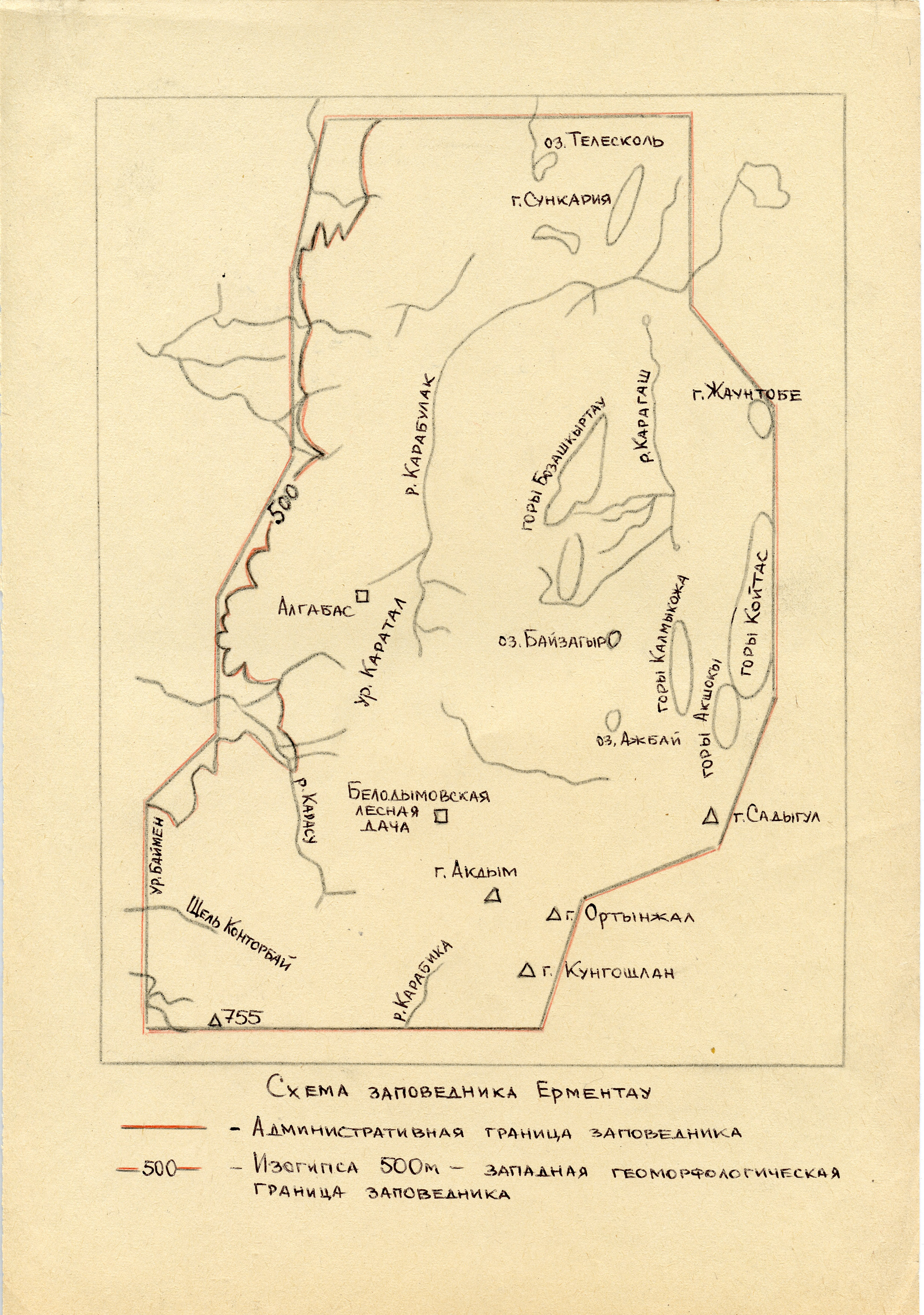 Схема заповедника Ерментау (Ерейментау) из обоснования проекта Целеноградского сельскохозяйственного института, 1982 год